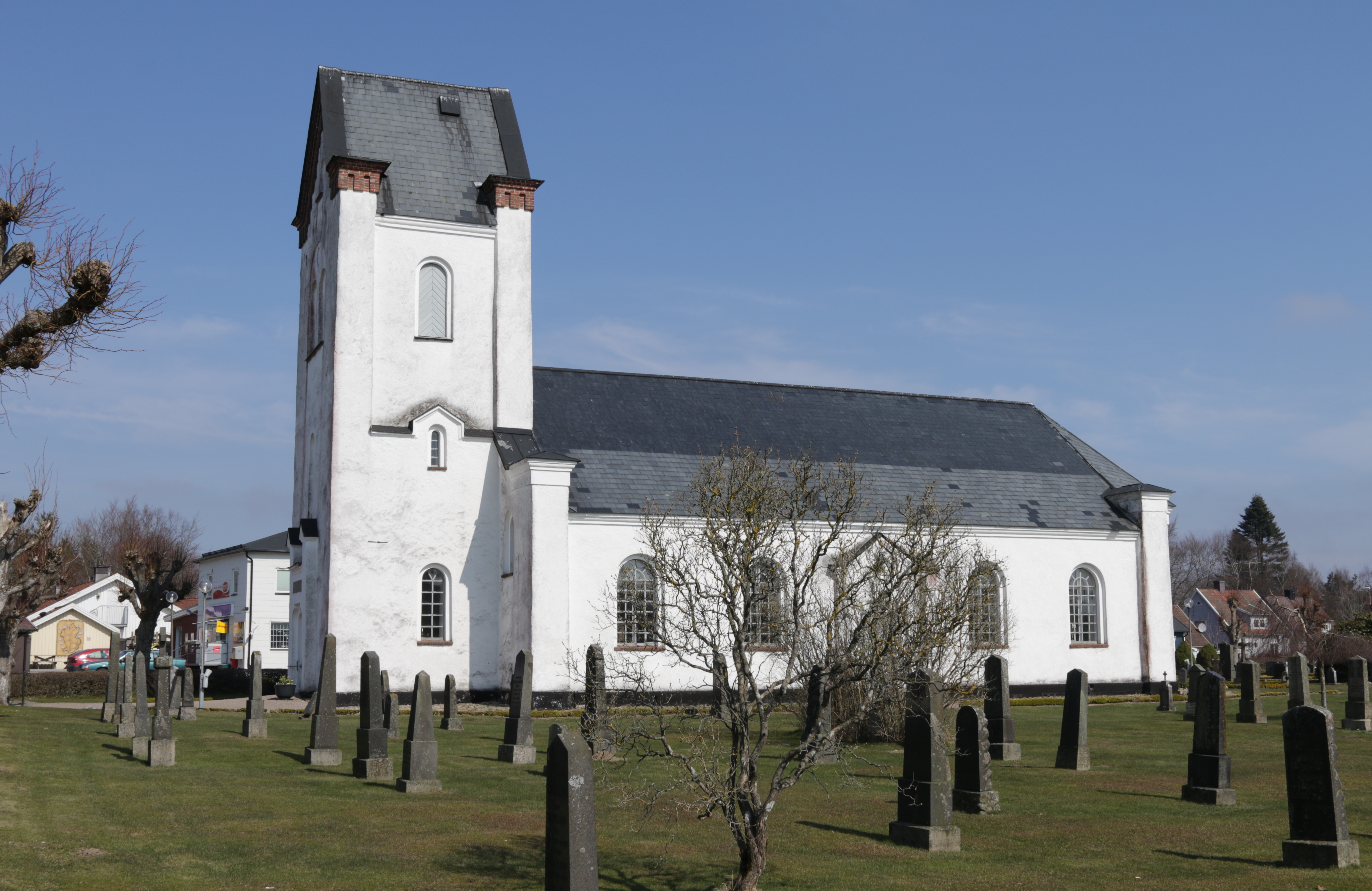 Svensköps kyrka april 2018